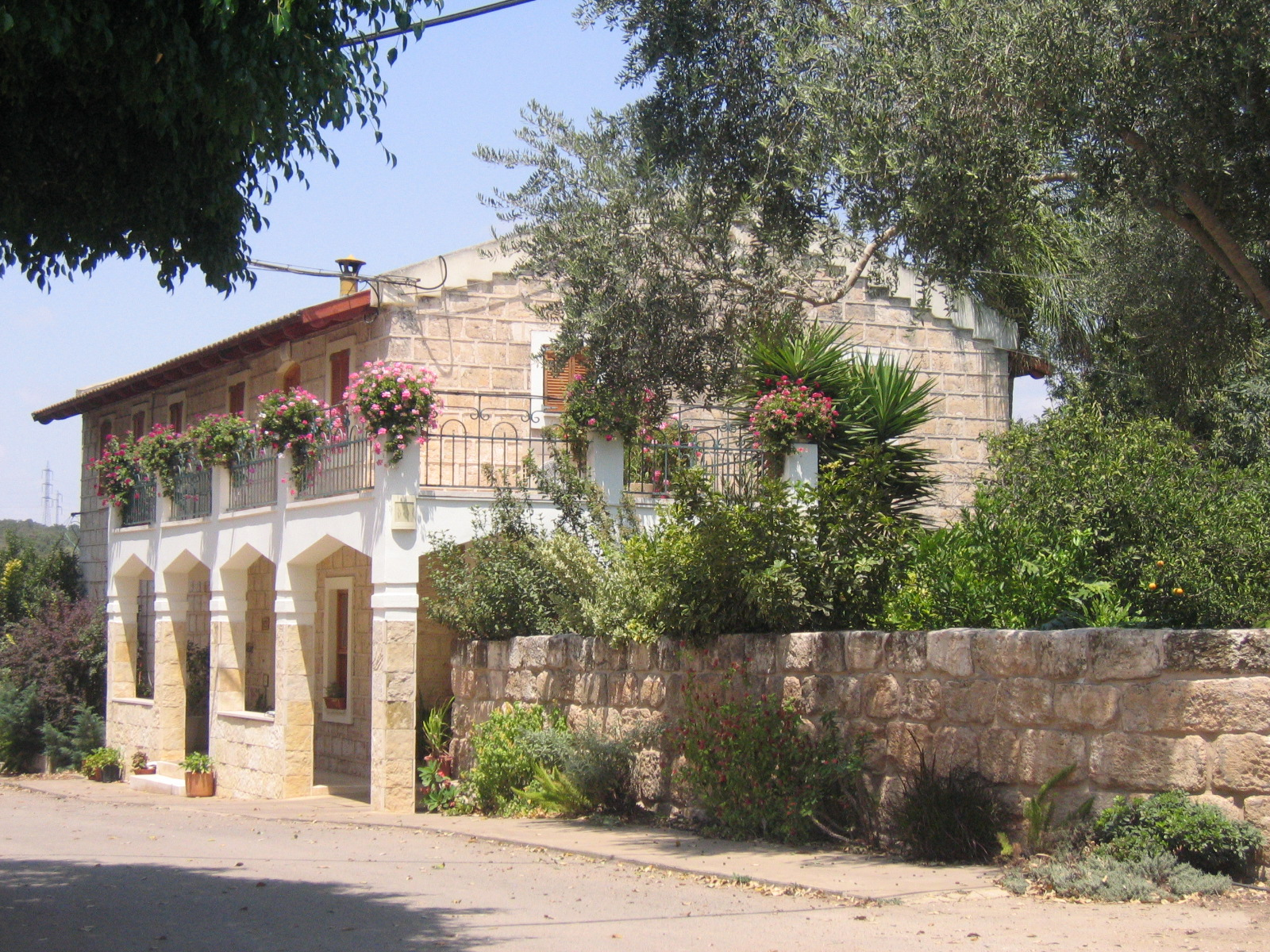 בית טמפלרי בבית לחם הגלילית תמונה שצילמתי אסף 09:15, 13 אוגוסט 2005 (UTC)